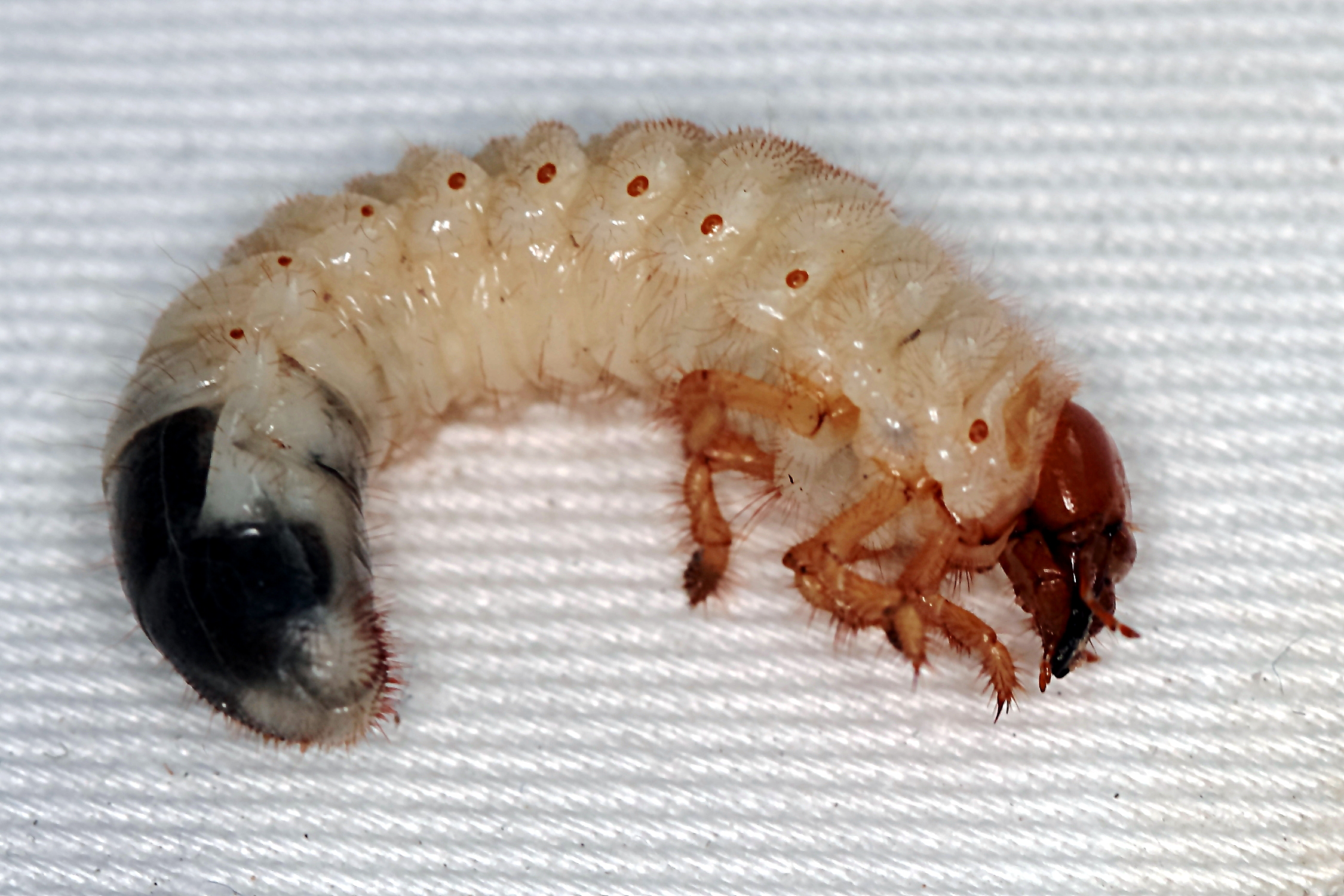 Engerling